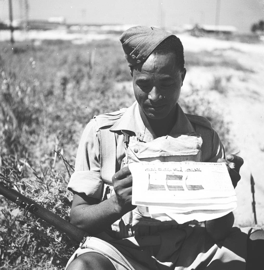 אוסף צילומים של הצלם זולטן קלוגר טווח מספרי התשלילים 19084 - 19169: Buffs באפס